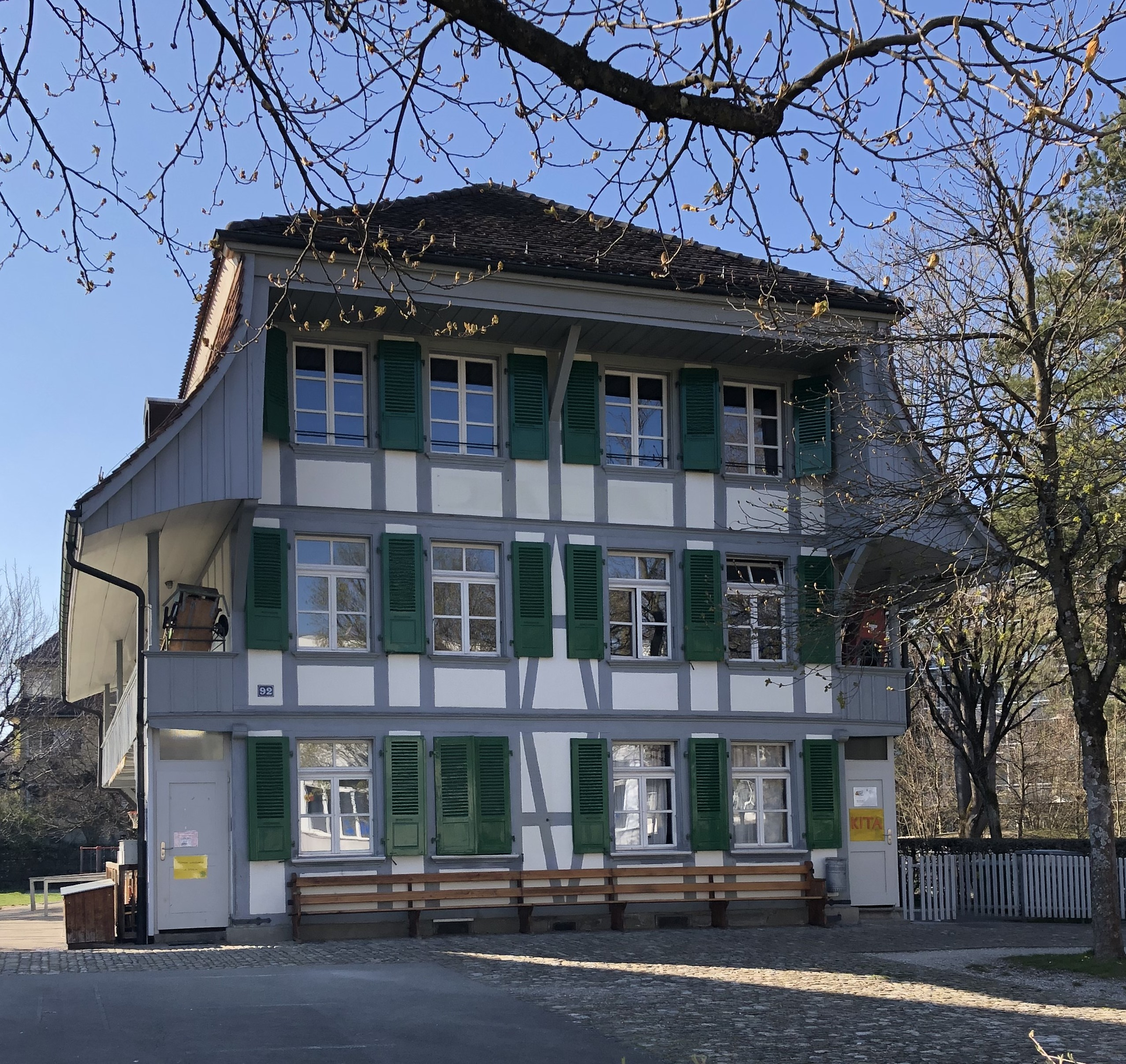 Kita und Tagi Bümpliz, Bümplizstrasse 92